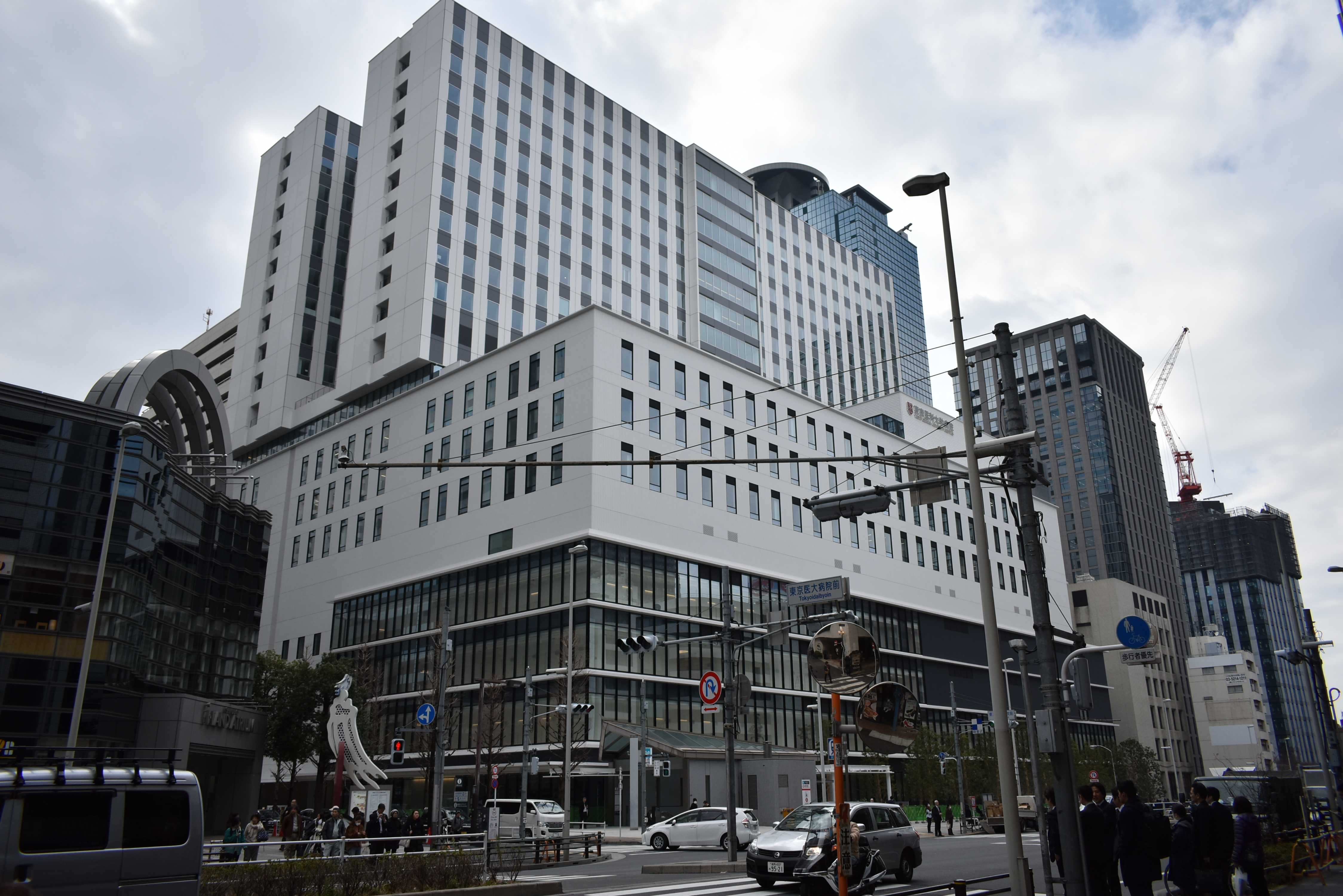 東京医科大学病院 Nikon D3400